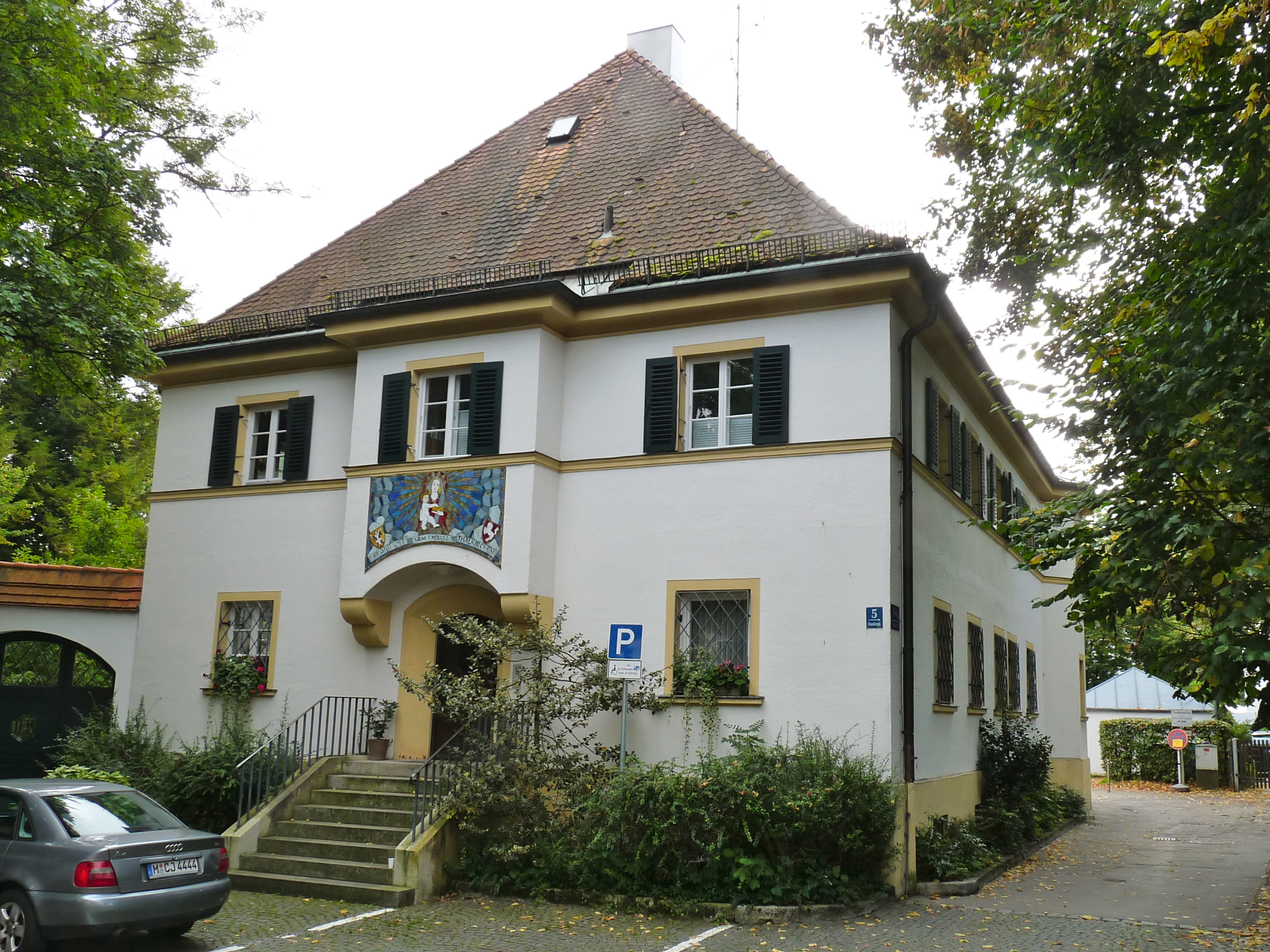 Ansicht des Fraunbergplatz 5 in München (Kath. Pfarrhaus, 1926-27 von Ludwig von Weckbecker.)This is a photograph of an architectural monument.